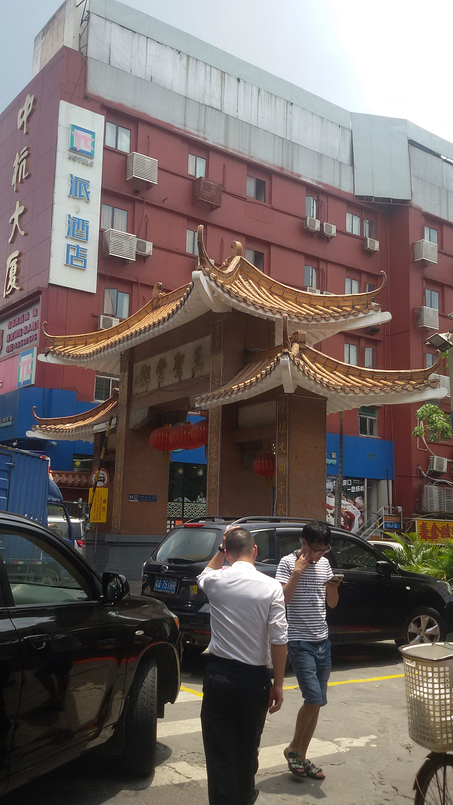 粵語: 王聖堂嘅牌坊